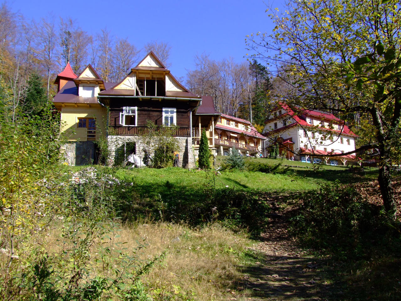 Ośrodek rekolekcyjny na Śnieżnicy (Beskid Wyspowy)